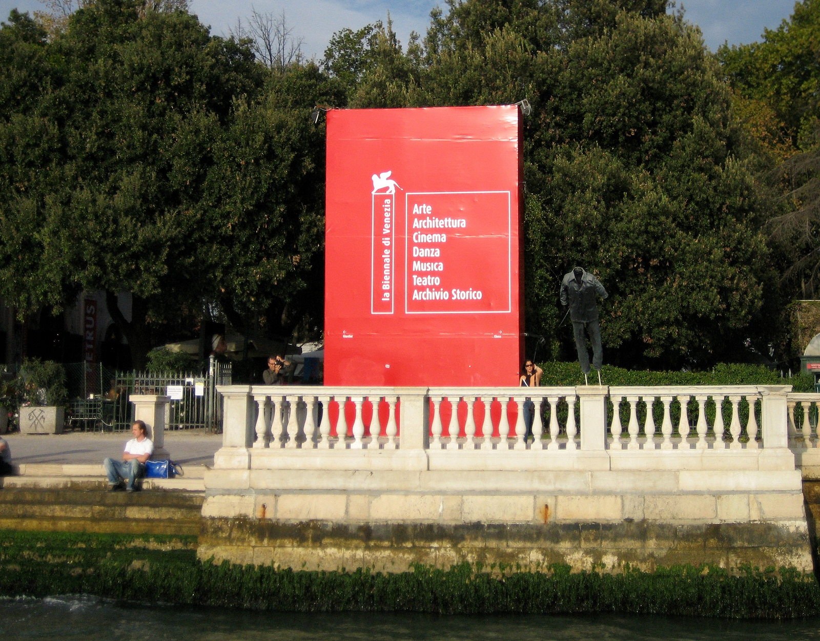 Entrance to the giardini in Venezia